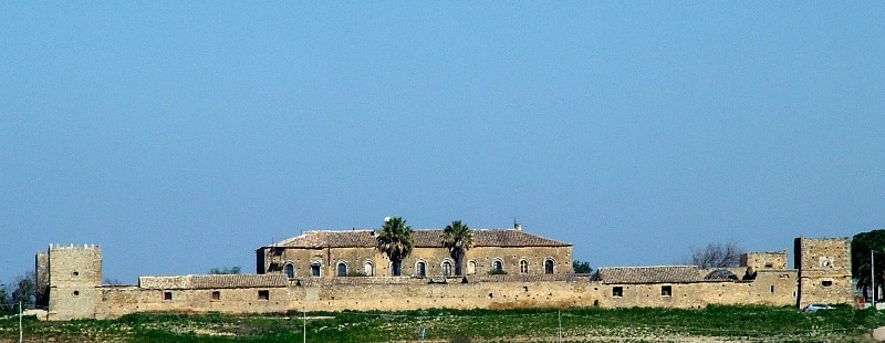 La foto è stata realizzata dal sottoscritto (Rosario Vizzini) e si rilascia nel pubblico dominio